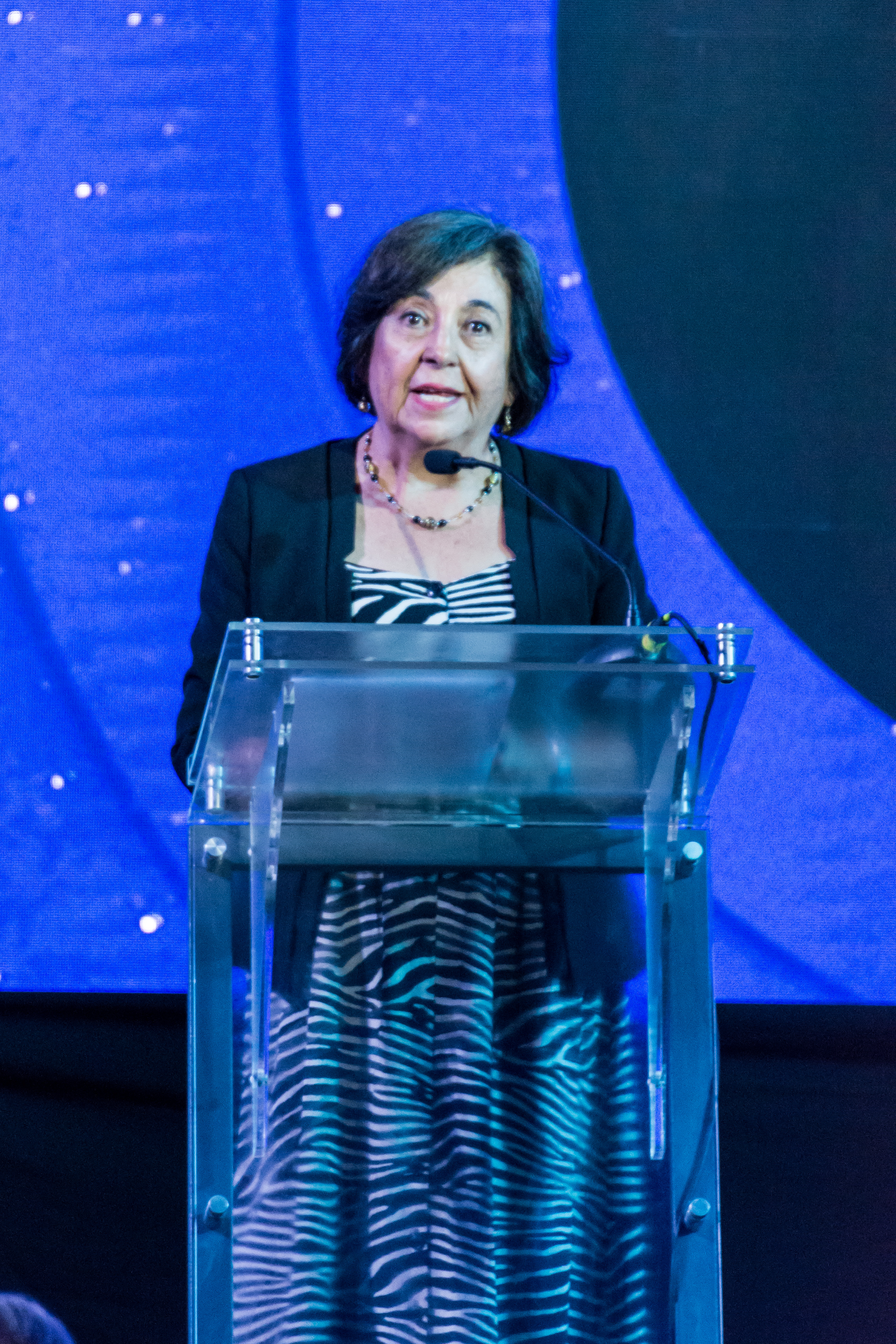 Inauguaración Congreso Futuro, Cecilia Hidalgo Tapia